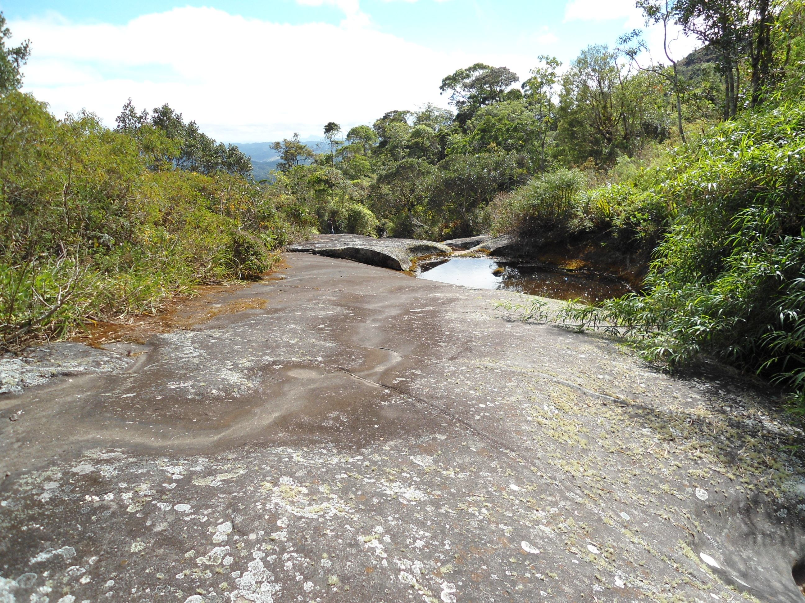 Laje de pedra que se torna em corredeiras nas chuvas.